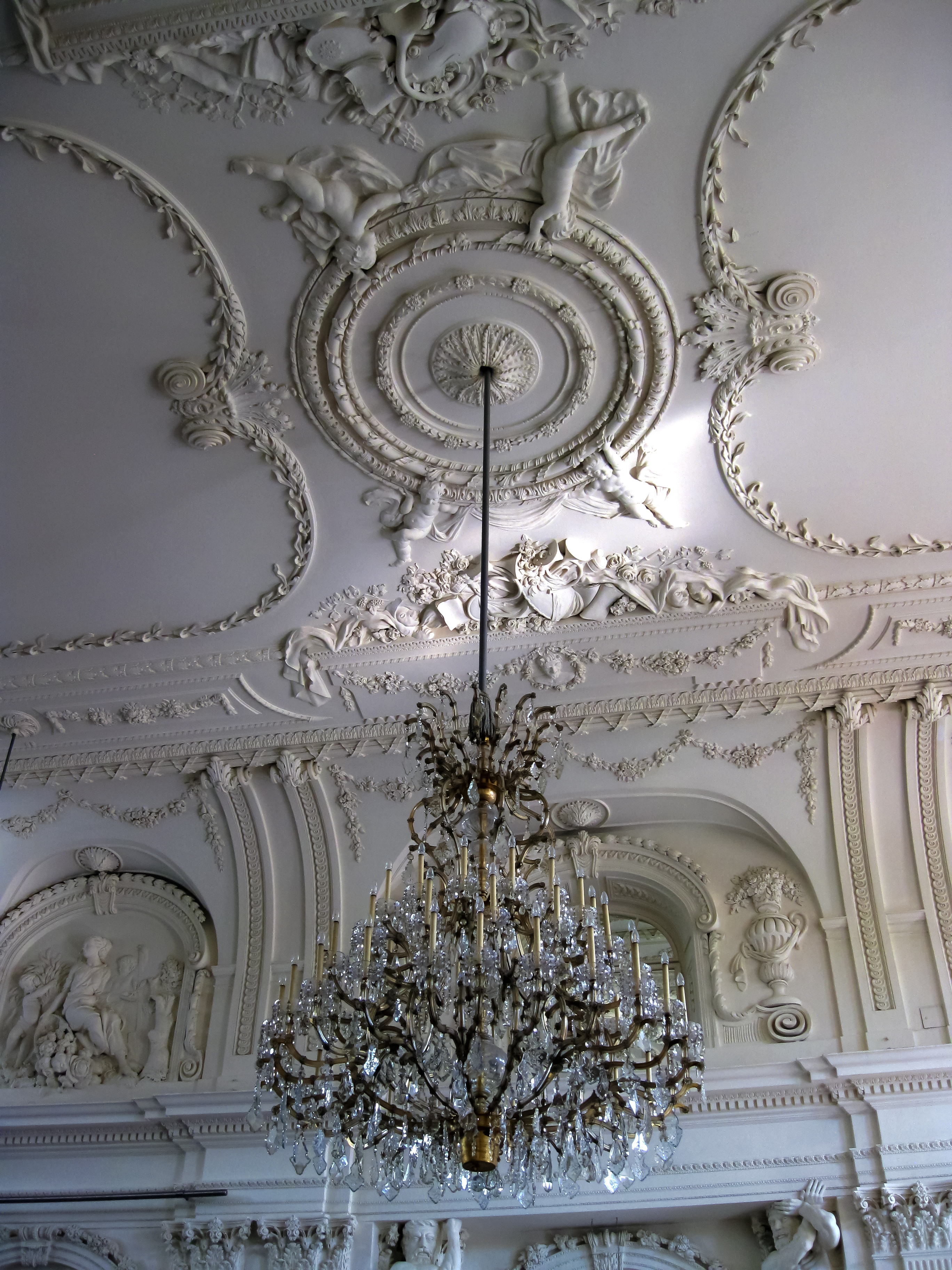 Der große Deckenleuchter mit Stuckornamenten an der DEcke des Ballsaals im Alten Kurhaus in Aachen